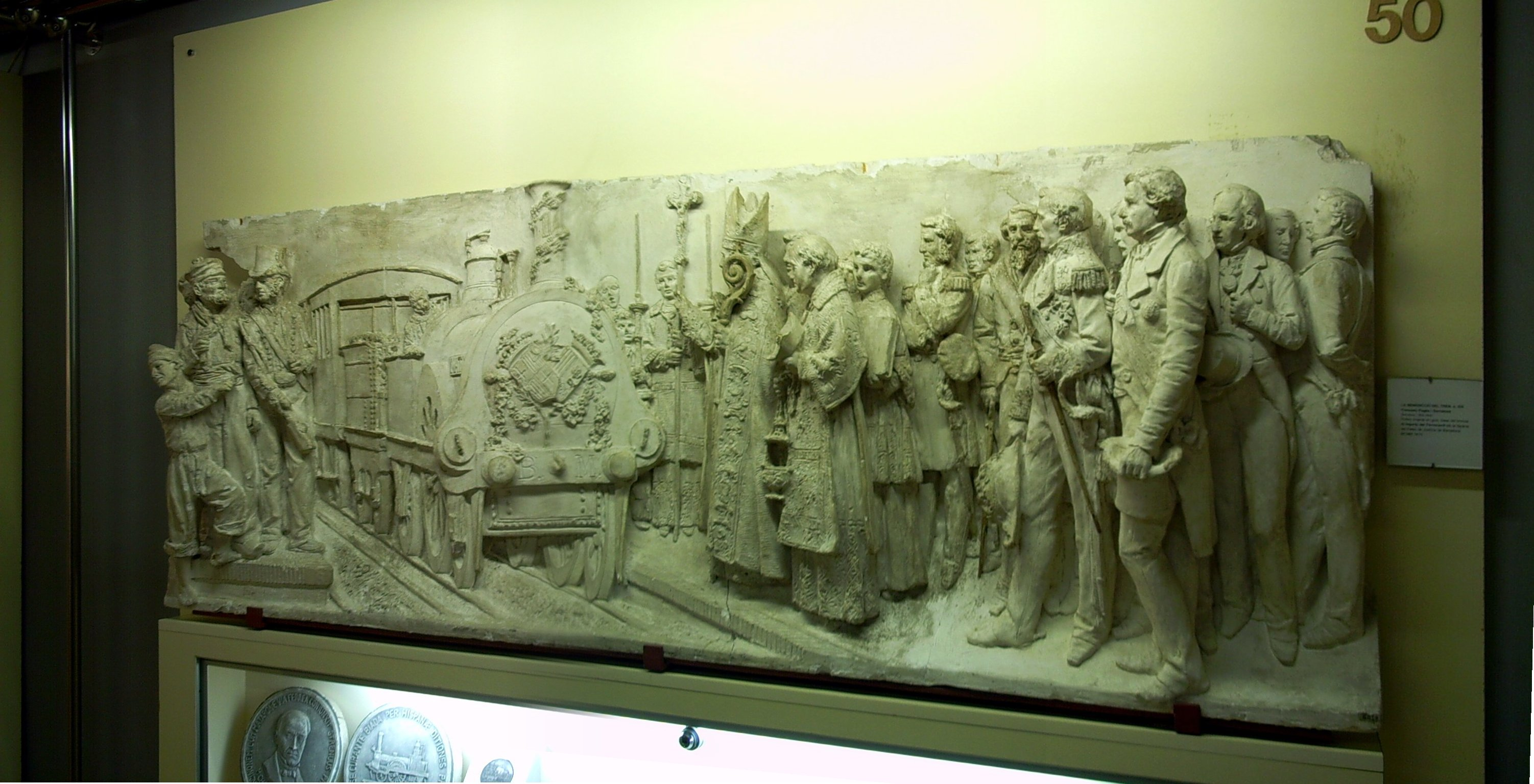 La Benedicció del tren, (segle XIX), Francesc Pagès i Serratosa (Barcelona, 1852-1899) relleu original en guix, base del bronze "Allegoria del Ferrocarril" de la façana del Palau de Justícia de Barcelona. Es conserva al Museu Comarcal de Mataró, número de catàleg MCMM 5415. Fotografia editada amb GIMP, a partir de dues imatges, la de la dreta ha estat deformada amb l'eina perspectiva, per coincidir amb la de l'esquerra